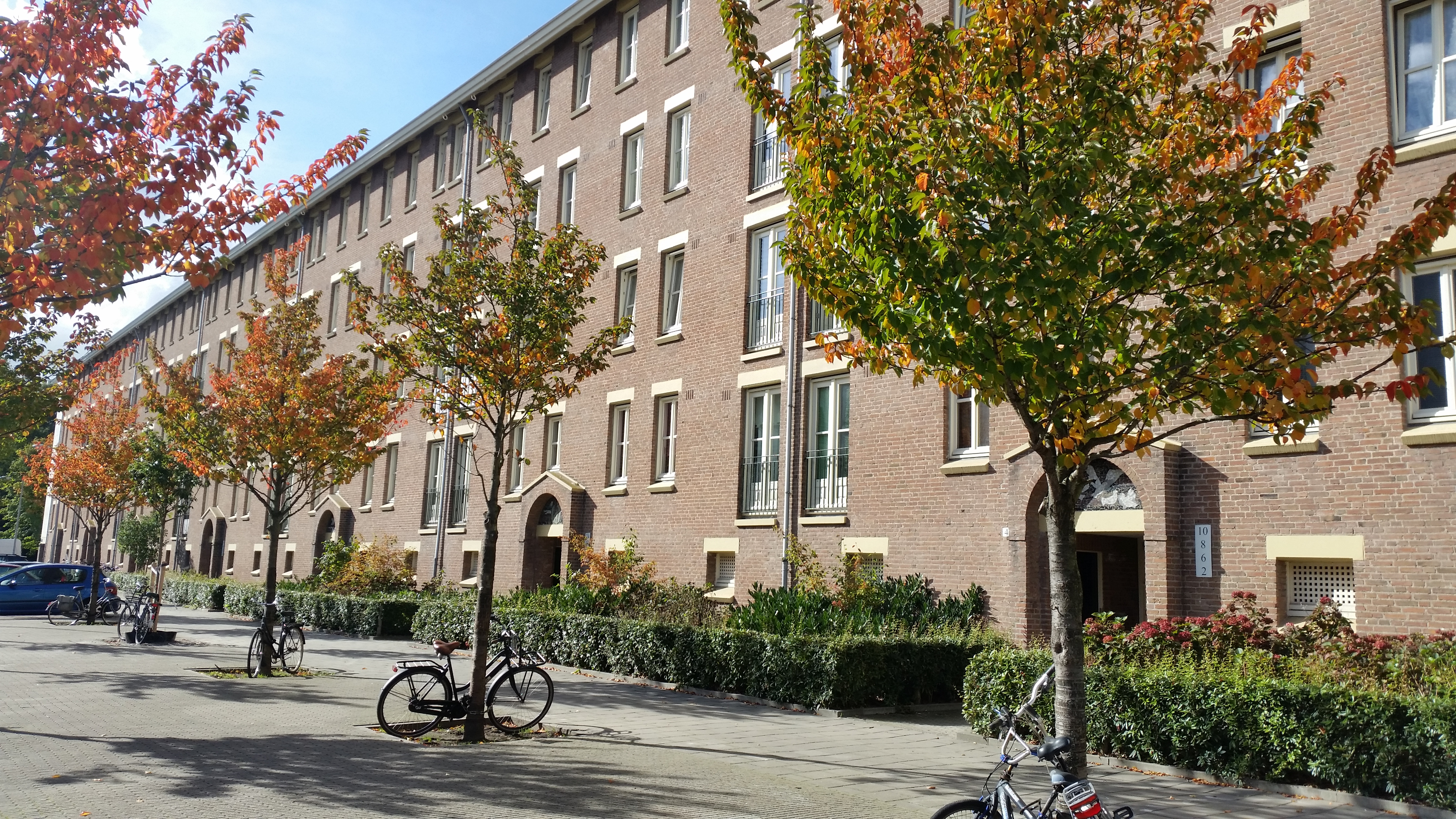 Speelmanstraat, Amsterdam, portieken aan even zijde; architect Evers en Sarlemijn